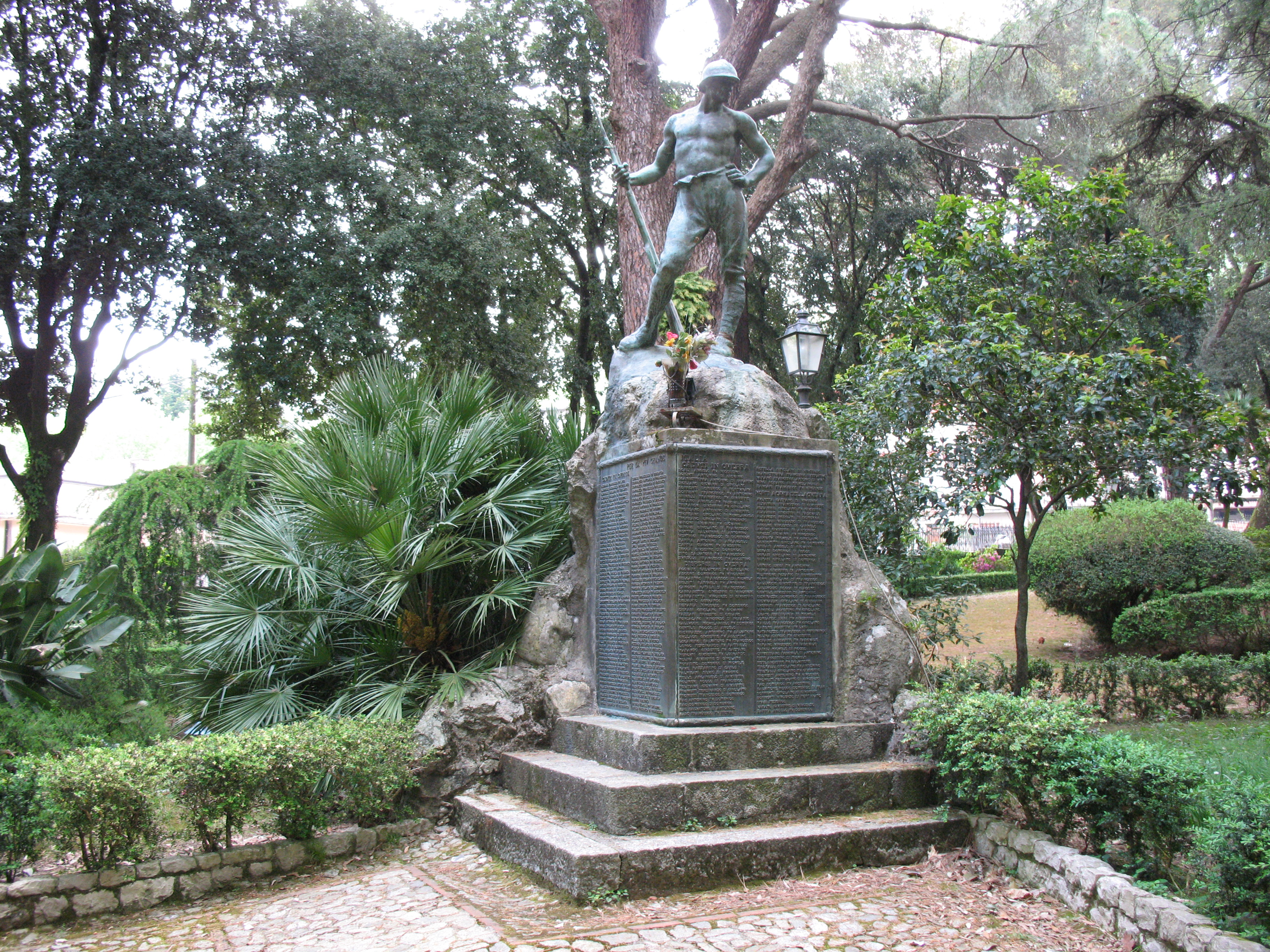 Foto del monumento ai caduti della I Guerra Mondiale. Opera di Michele Guerrisi (1924) presente preso la Villa Comunale di Cittanova (RC), Italy